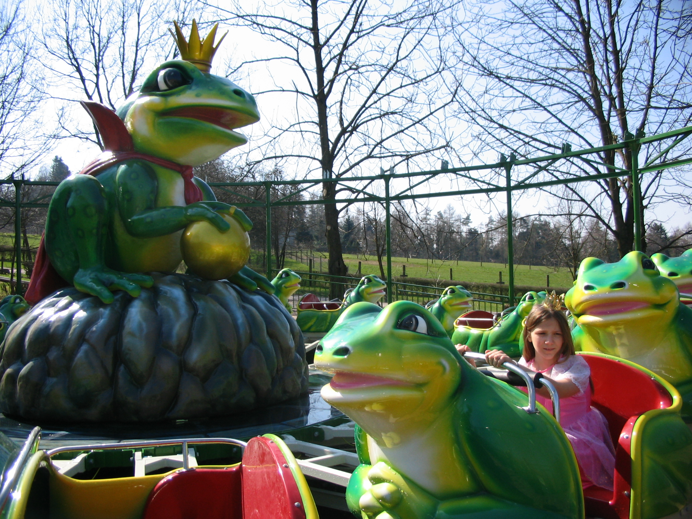 Berg- und Talbahn "Froschkönig"